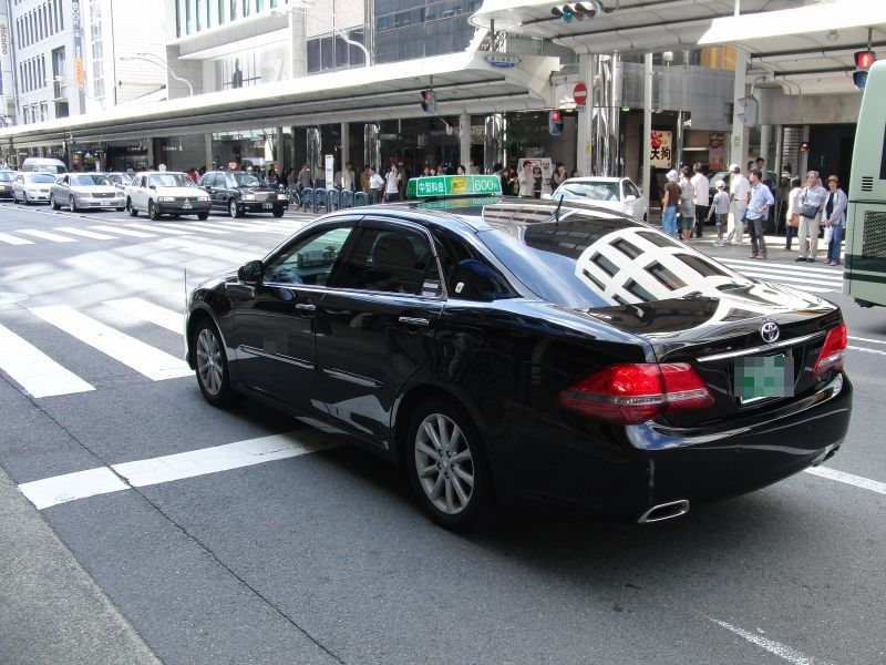 個人タクシー S200型クラウン